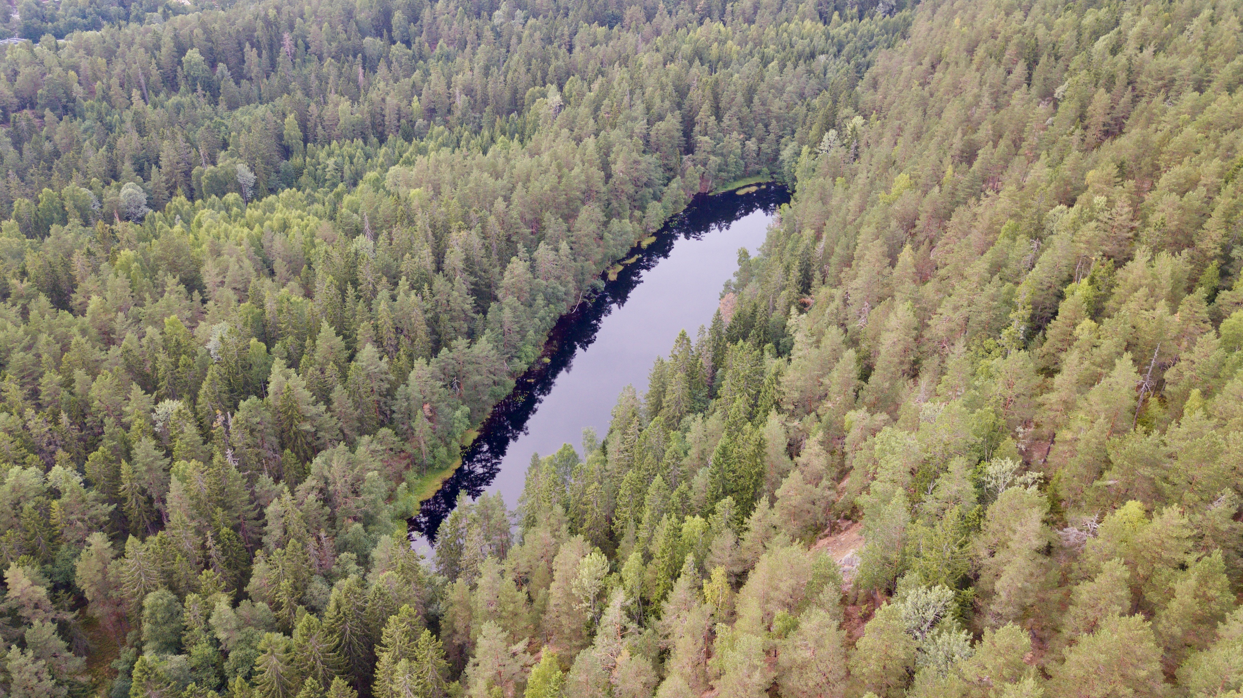 Skøyenputten i Østmarka i Oslo.